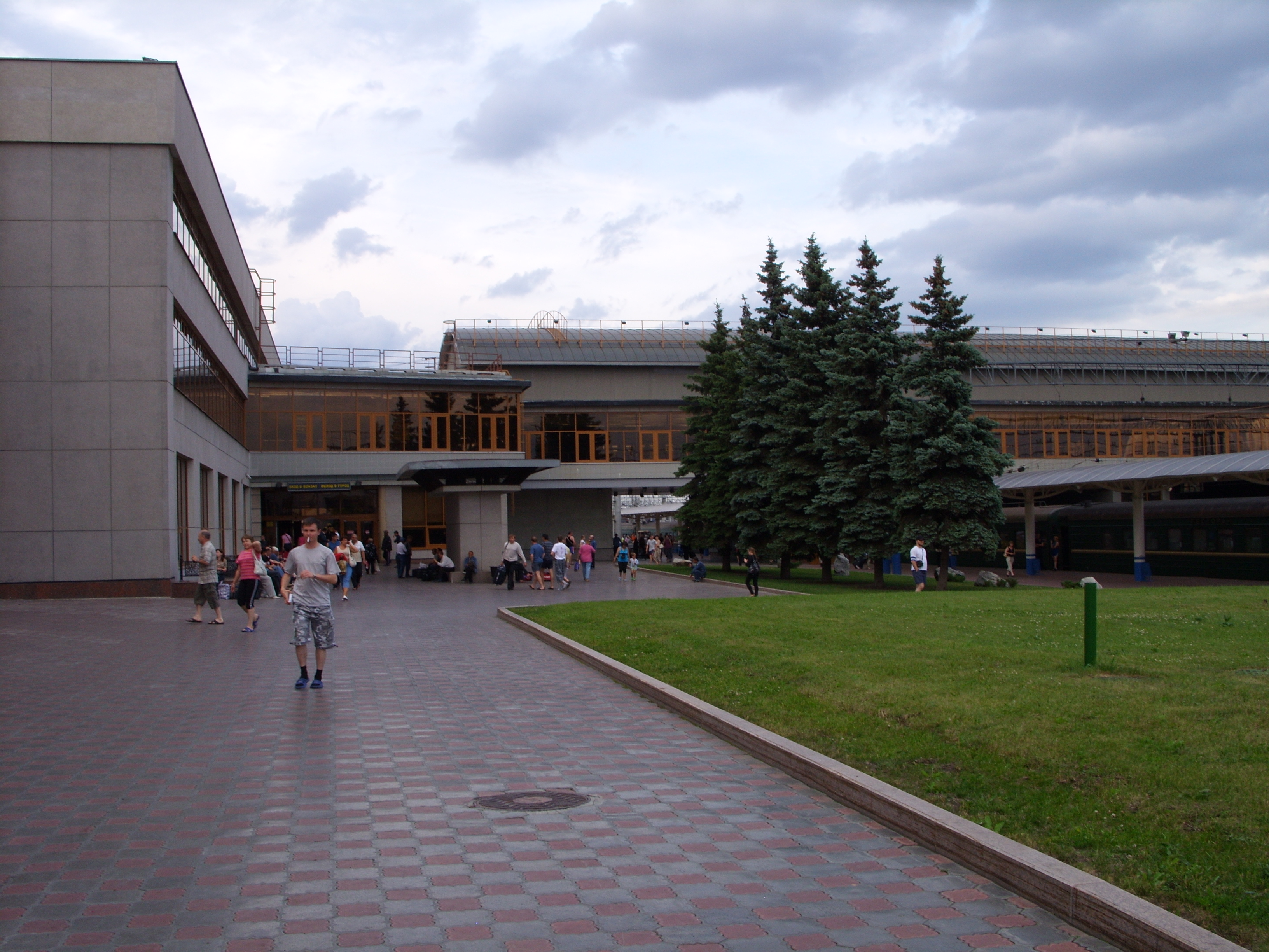 снимки июля 2009 г.